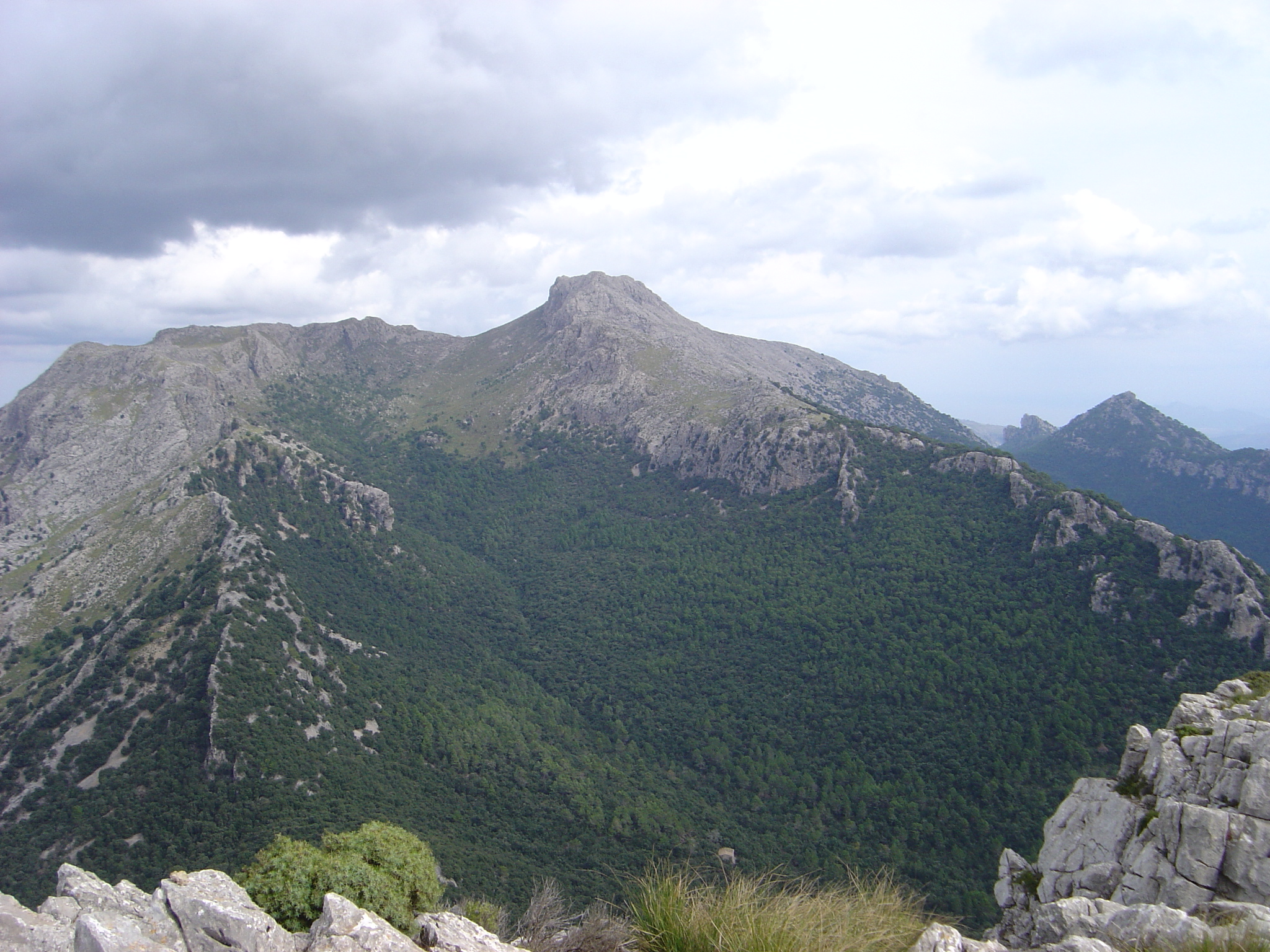 El Massanella, vist des dels Tossals. Escorca. Mallorca.